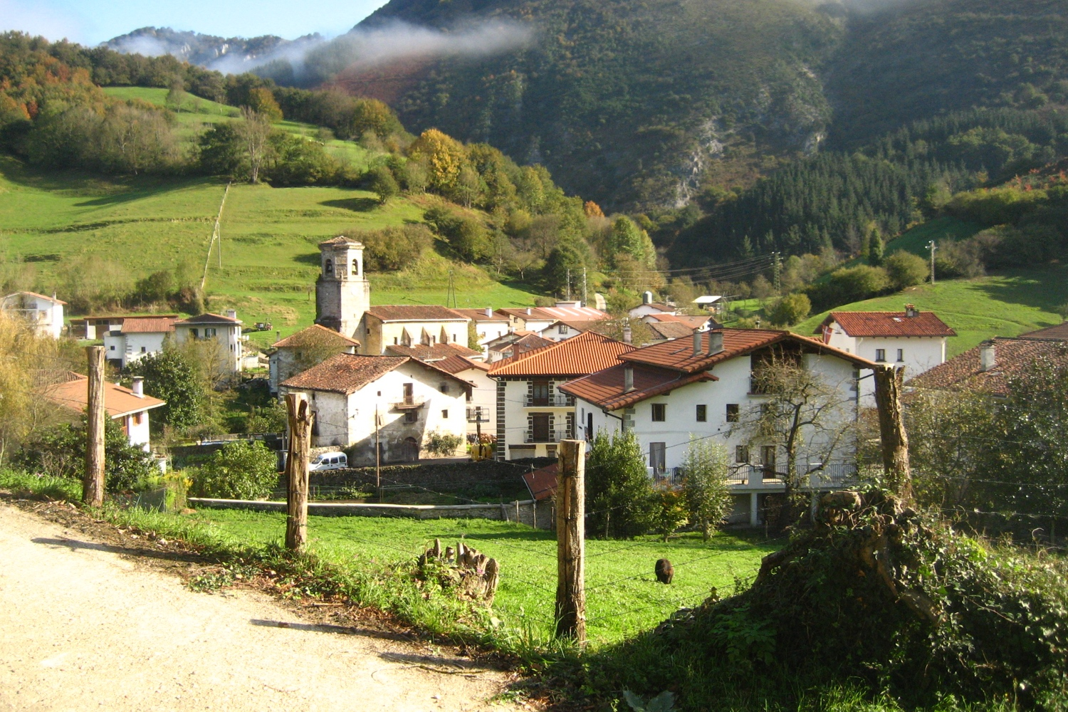 Arribe Araitz bailarako herria.